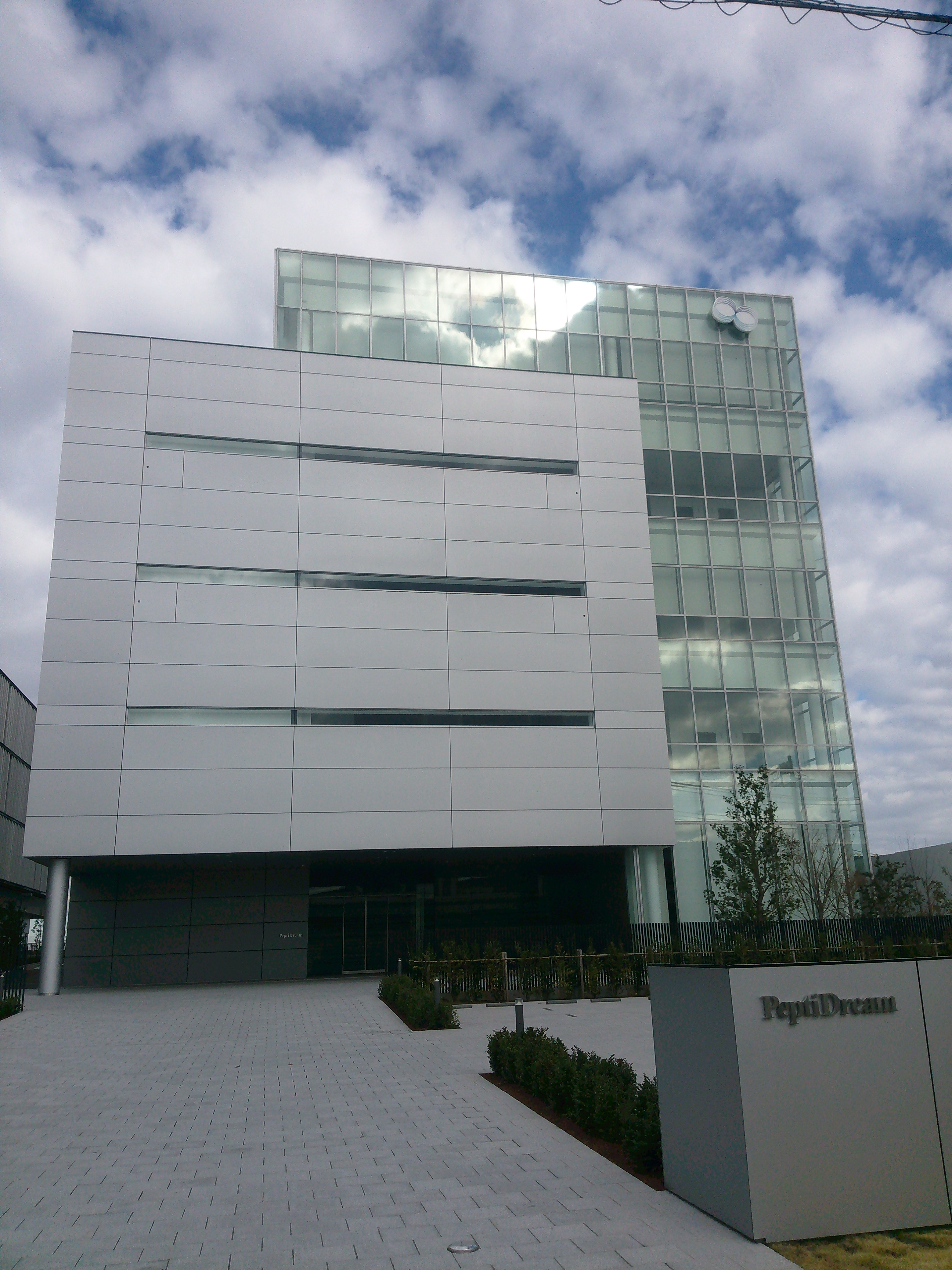 神奈川県川崎市川崎区殿町、ペプチドリーム本社・研究所